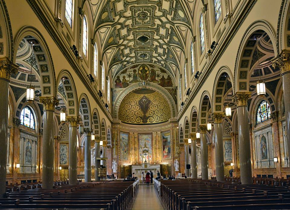 Interior